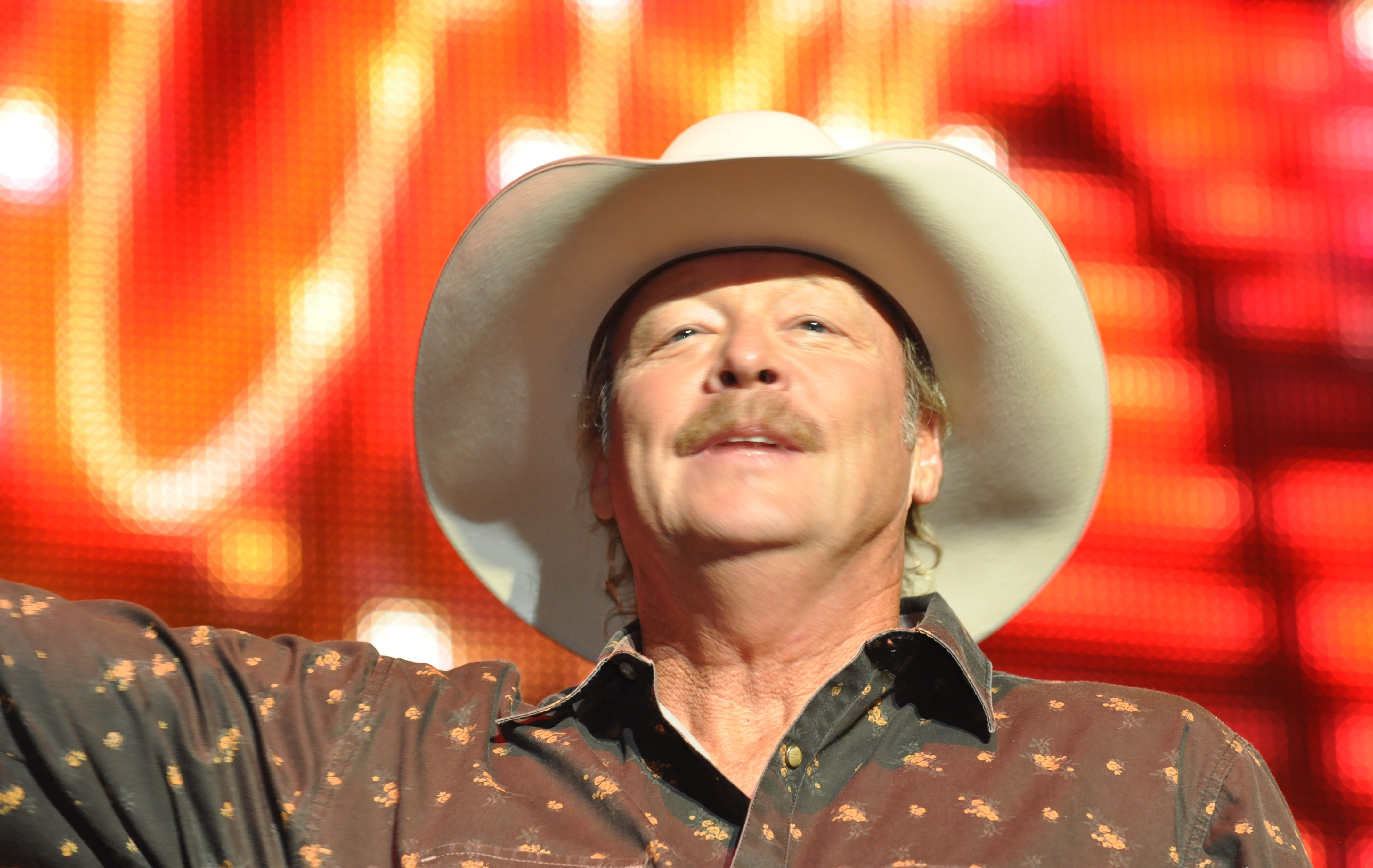 Alan Jackson -DSC_9835-8.24.12